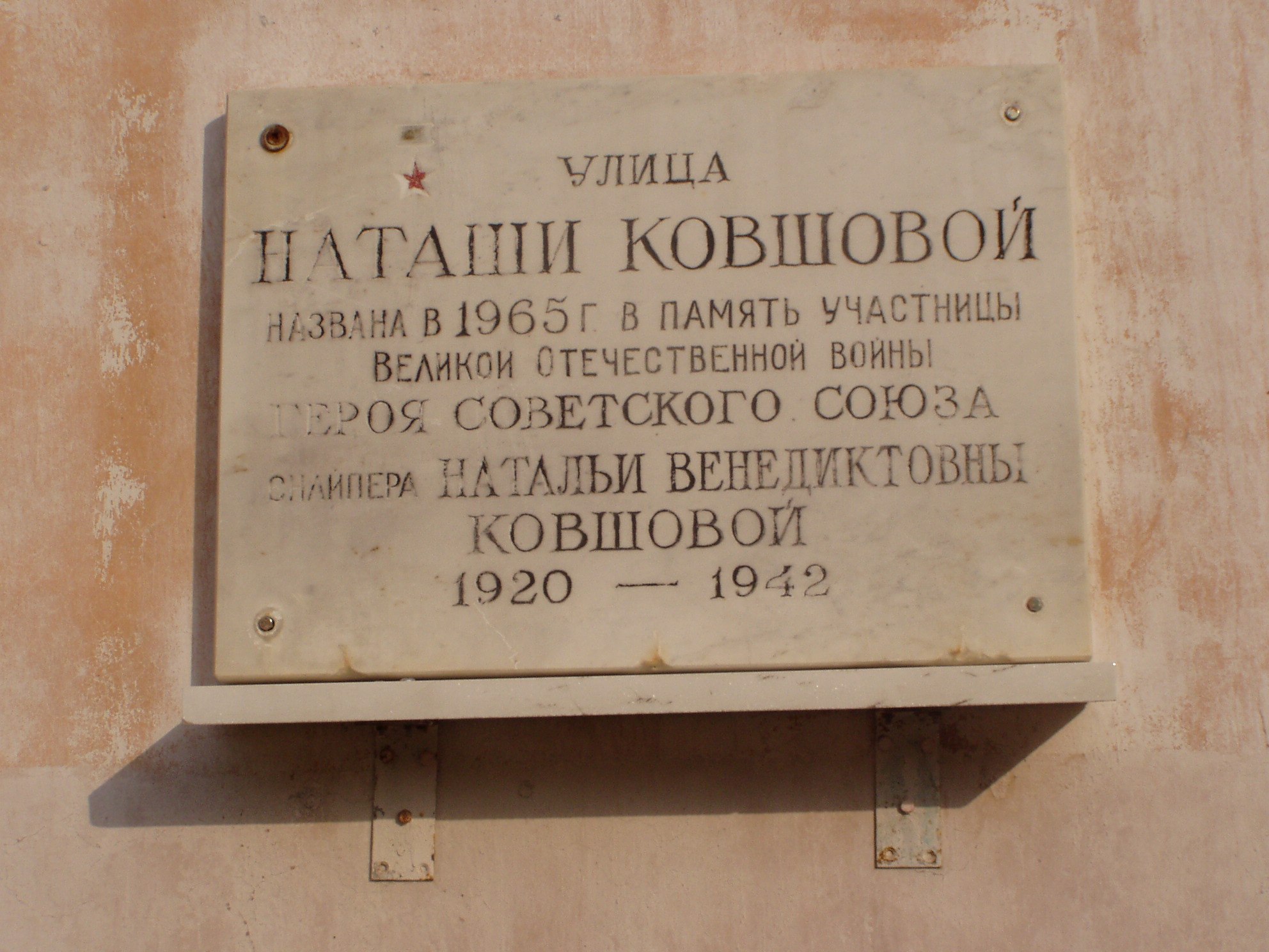 Мемориальная доска на улице Наташи Ковшовой в Москве.